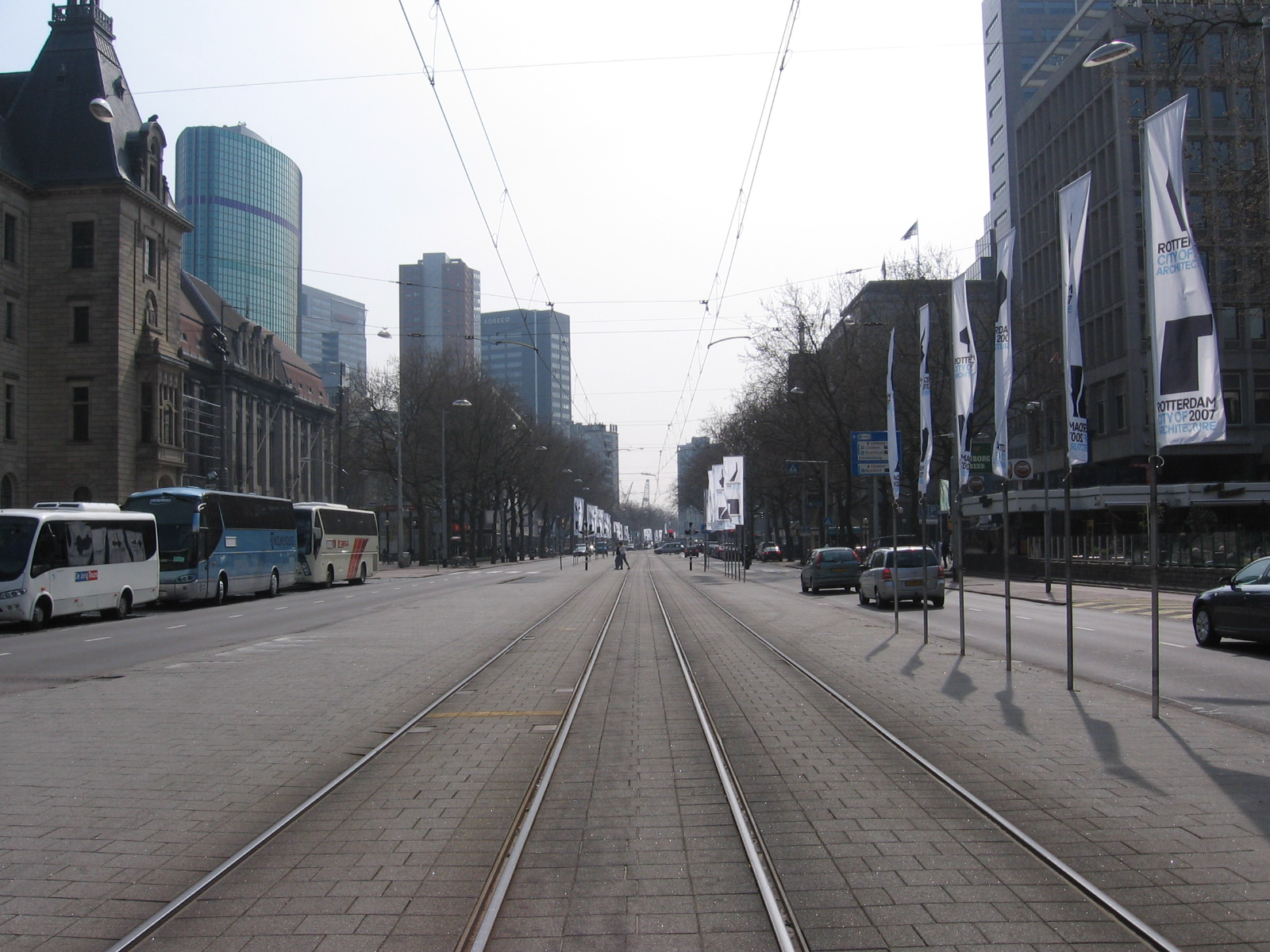 De Coolsingel gezien vanaf het Stadhuis richting het zuiden op 6 april 2007.